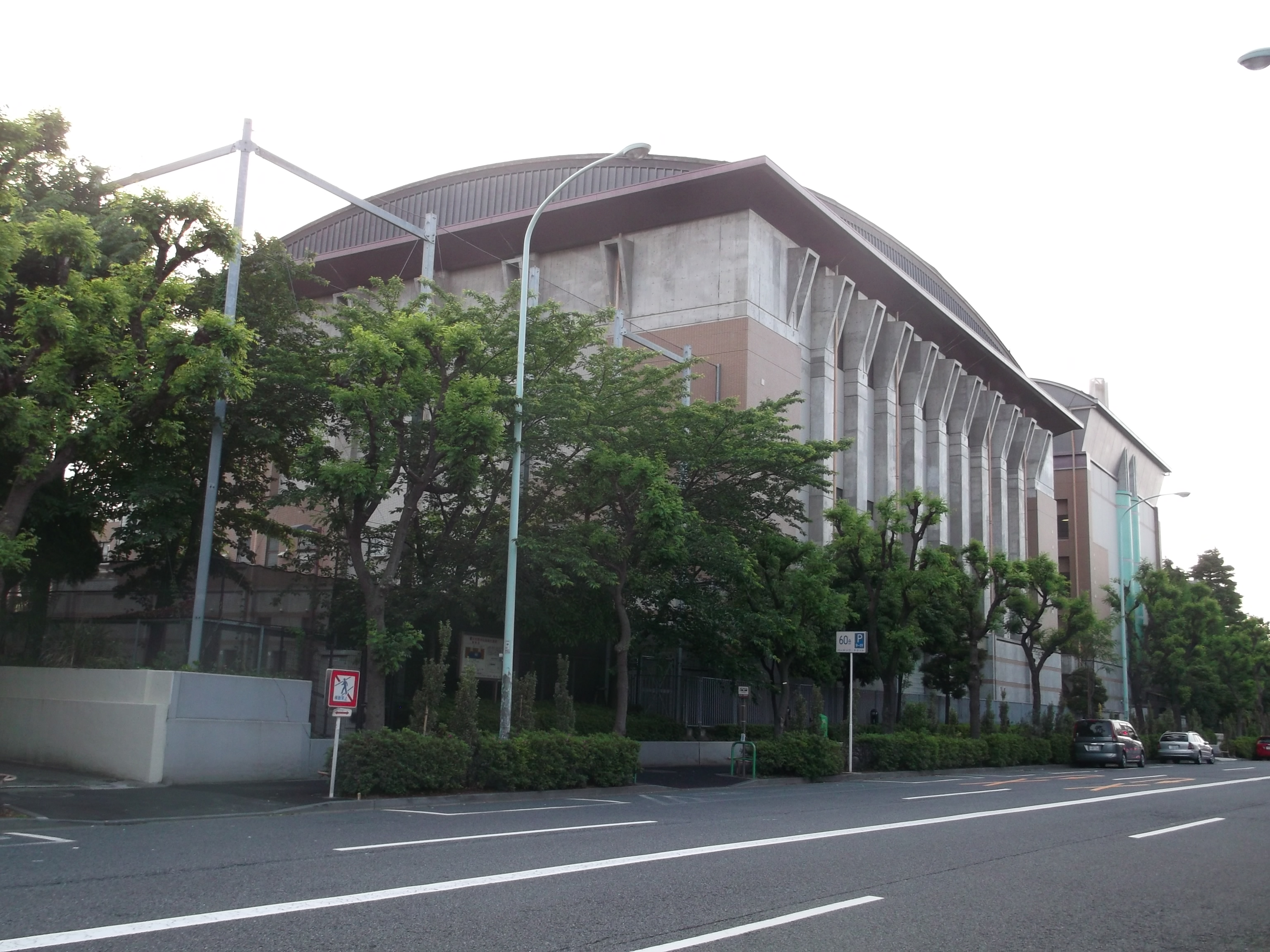 旧山手通りからみた東京都立第一商業高等学校